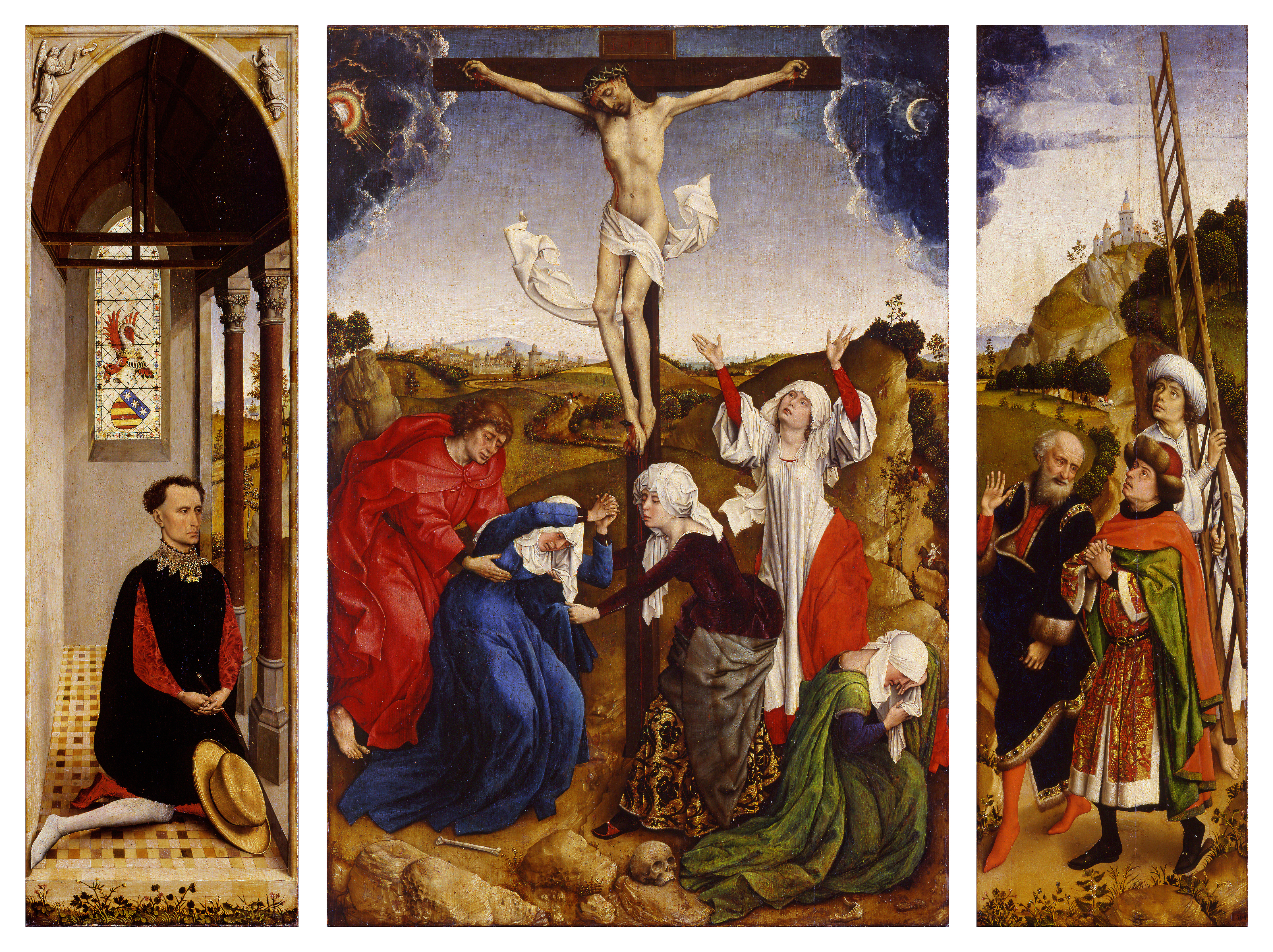 Triptyque de Rogier van der Weyden pour Oberto Villa. Conservé à Berne (Riggisberg), à l'abbaye Abbegg